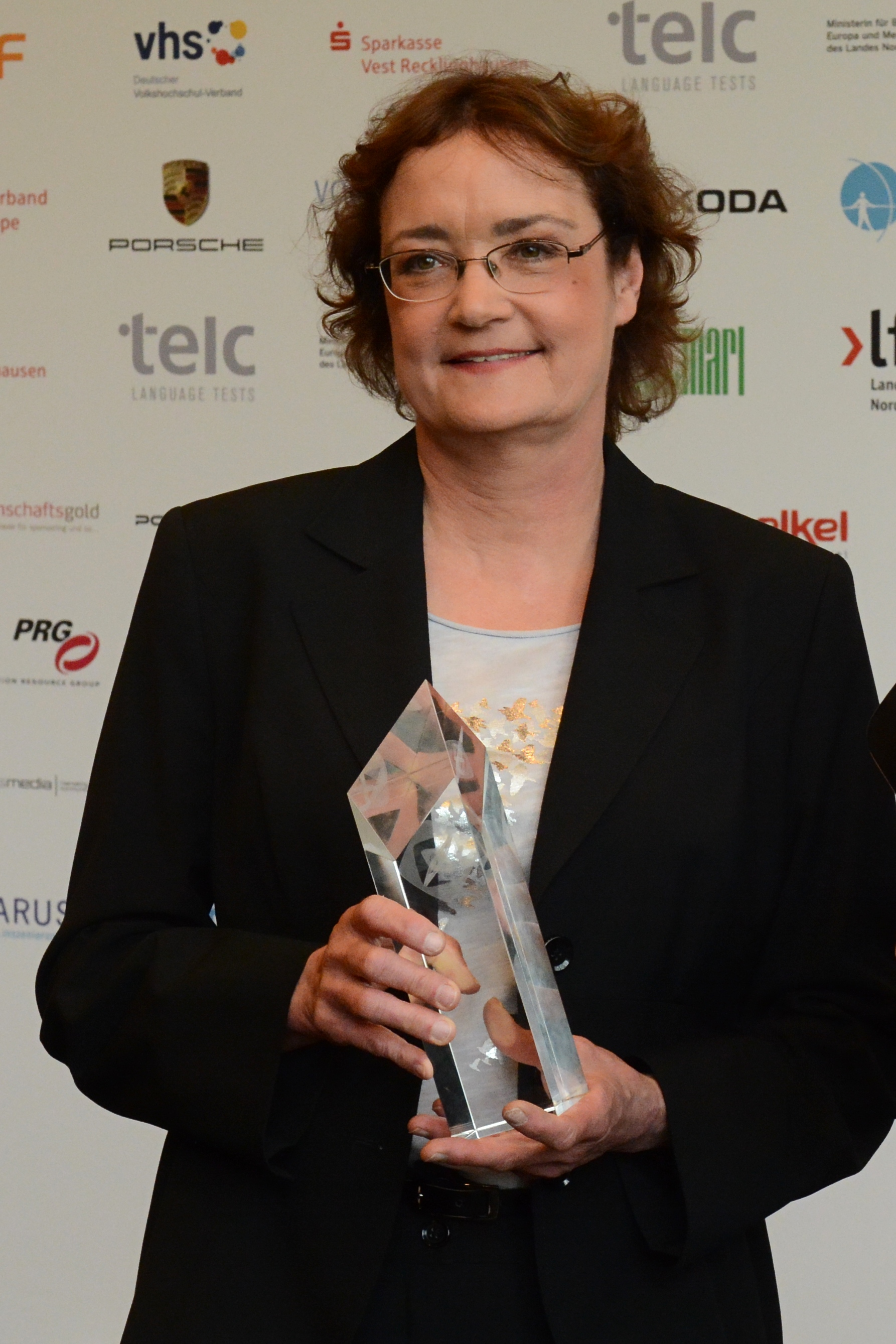 Andrea Schröder-Jahn bei der Verleihung des Grimme-Preises 2014.